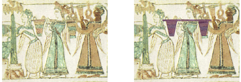 Sarcophage d’Hagia Triada, XVème siècle av J.C. - Detail et comparaion avec le signe 14 du Disque de Phaistos